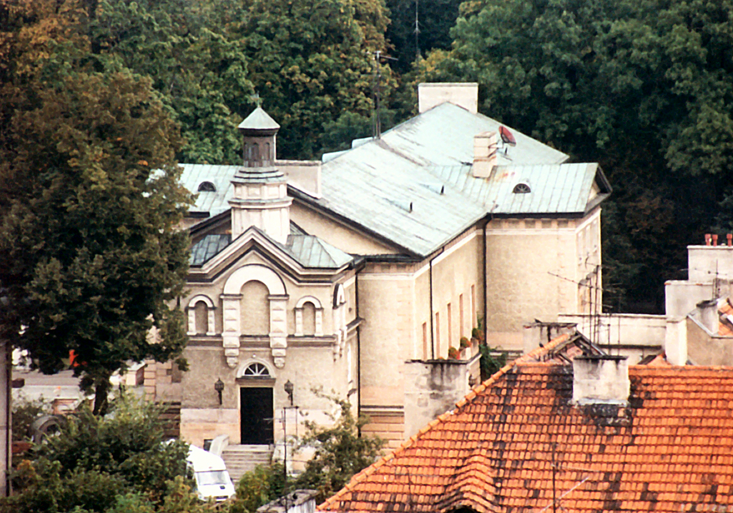 Kalisz, dawna cerkiew prawosławna p.w. św. Jerzego